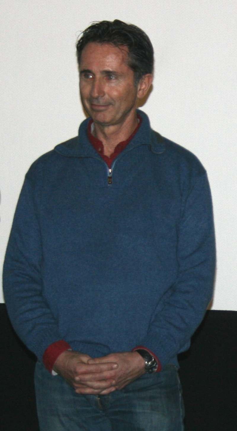 Thierry Lhermitte à l'avant-première de Notre univers impitoyable diffusée à l'UGC Ciné Cité Les Halles, à Paris.